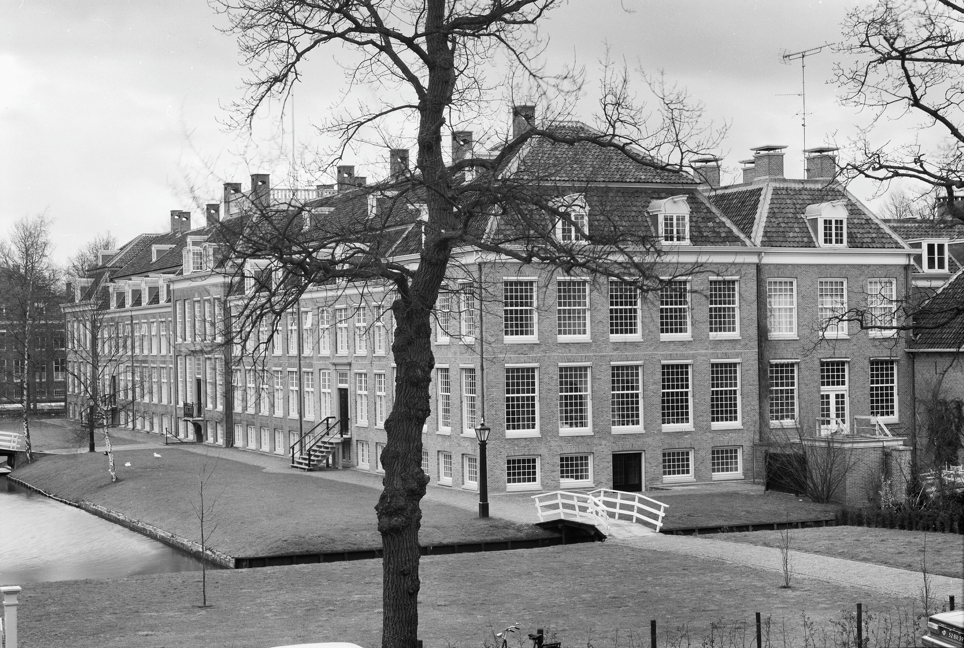 Hernhutterscomplex: achterzijde gebouw Broederhuis